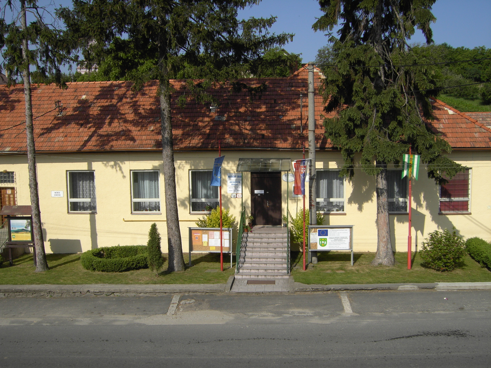 Beschreibung: Rathaus von Csáb eigenes Foto von User:Ralf 69 Datum:18.06.2006